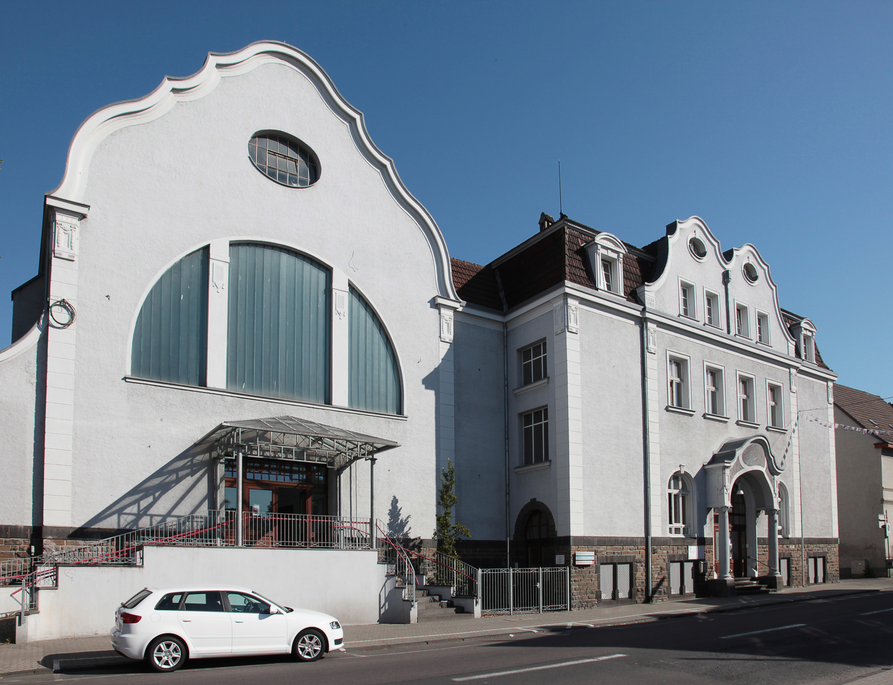 Altes Hallenbad 2011